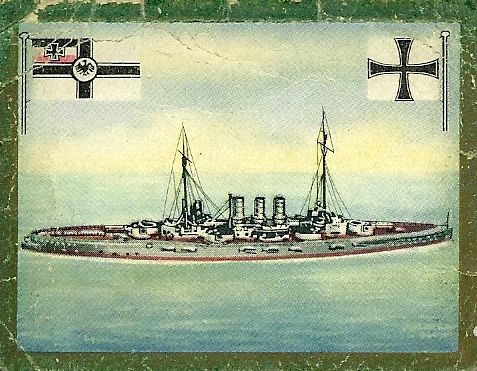 "Saba"-Schiffsbilder, Sammelbild Nr. 5, Serie A (Deutschland/Österreich), Abt. I (Kriegsschiffe) - Linienschiff "Ostfriesland" (Frühere Deutsche Marine)